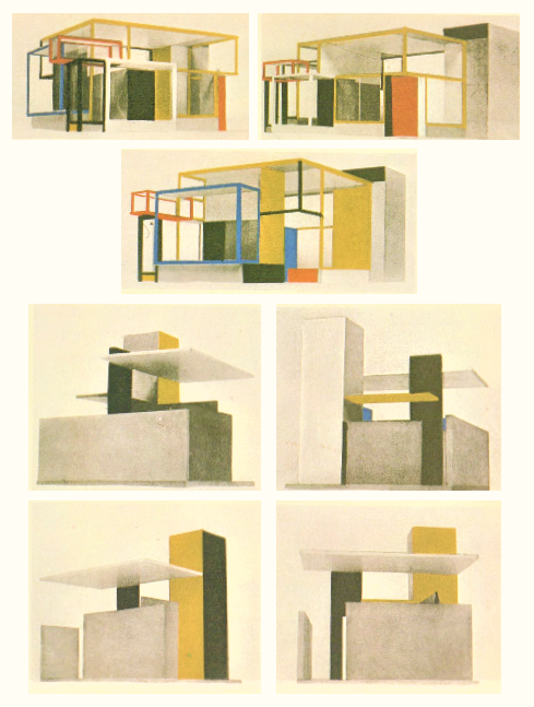 W. van Leusden, exposition, Paris, 1923 (image du domaine public modifiée)